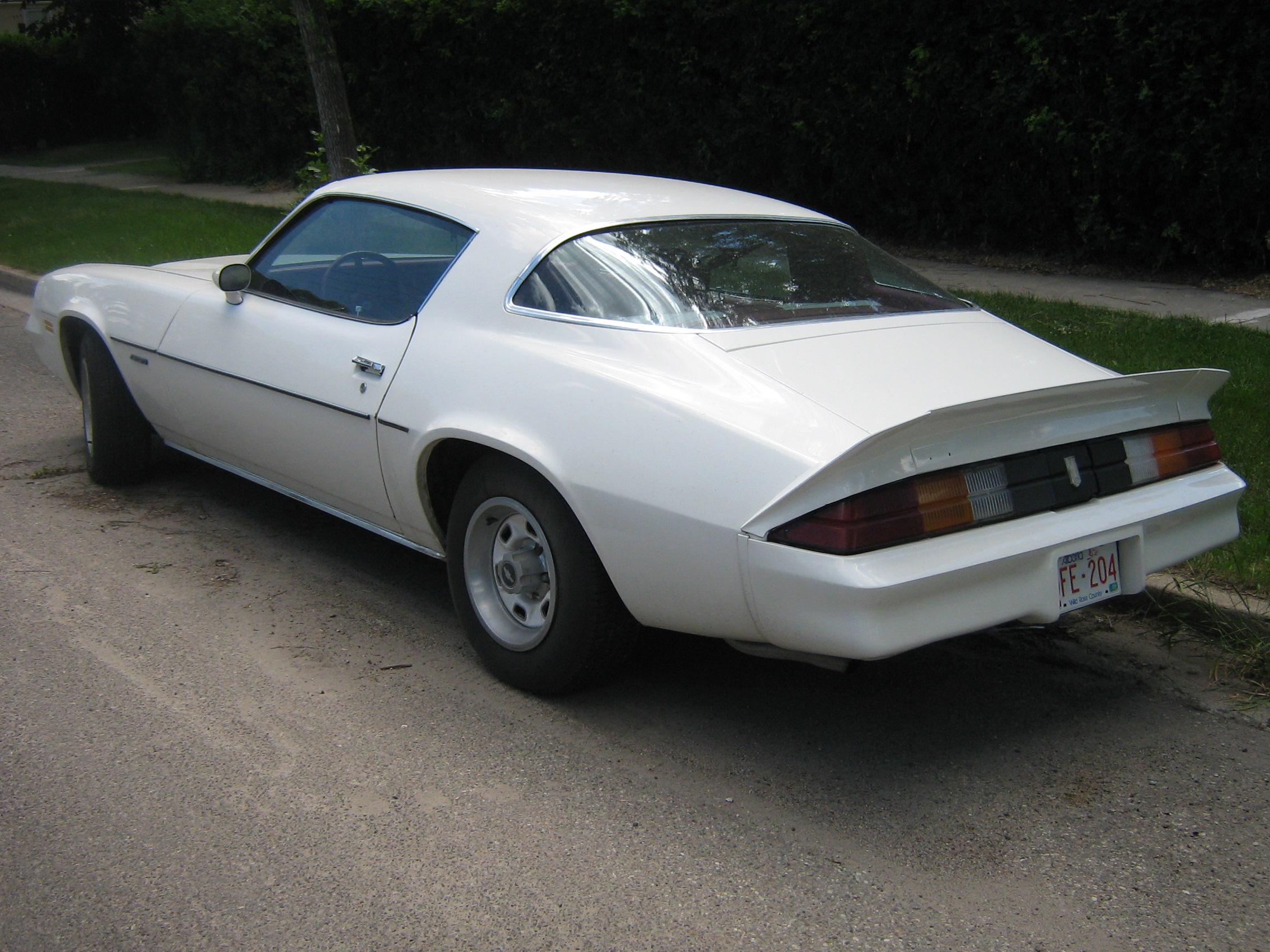 Chevrolet Camaro